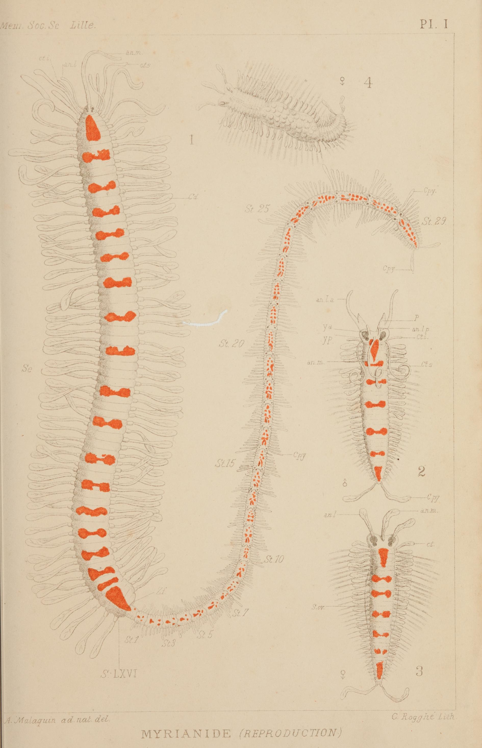 Recherches sur les syllidiens : morphologie, anatomie, reproduction, développement /